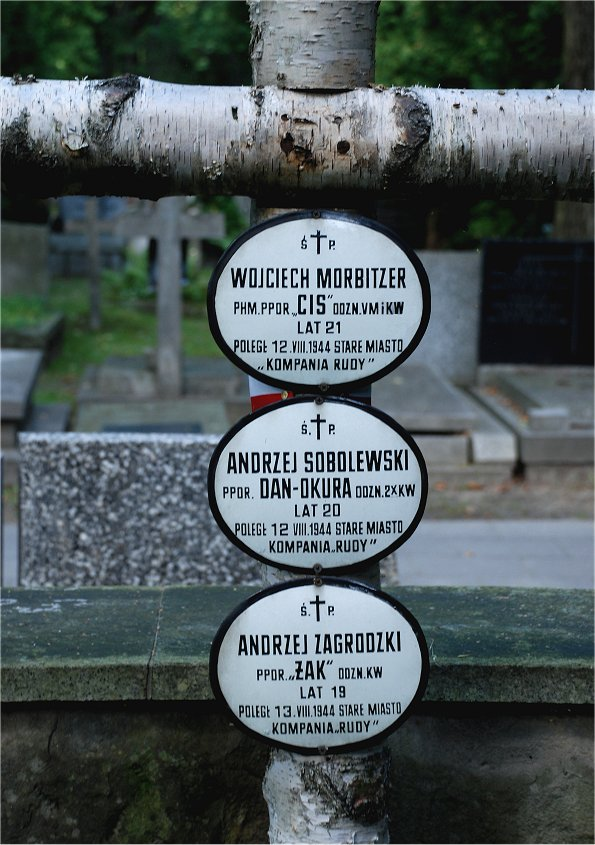 grób Wojciecha Morbitzera, Andrzeja Sobolewskiego i A. Zagrodzkiego na Powązkach wojskowych w Warszawie